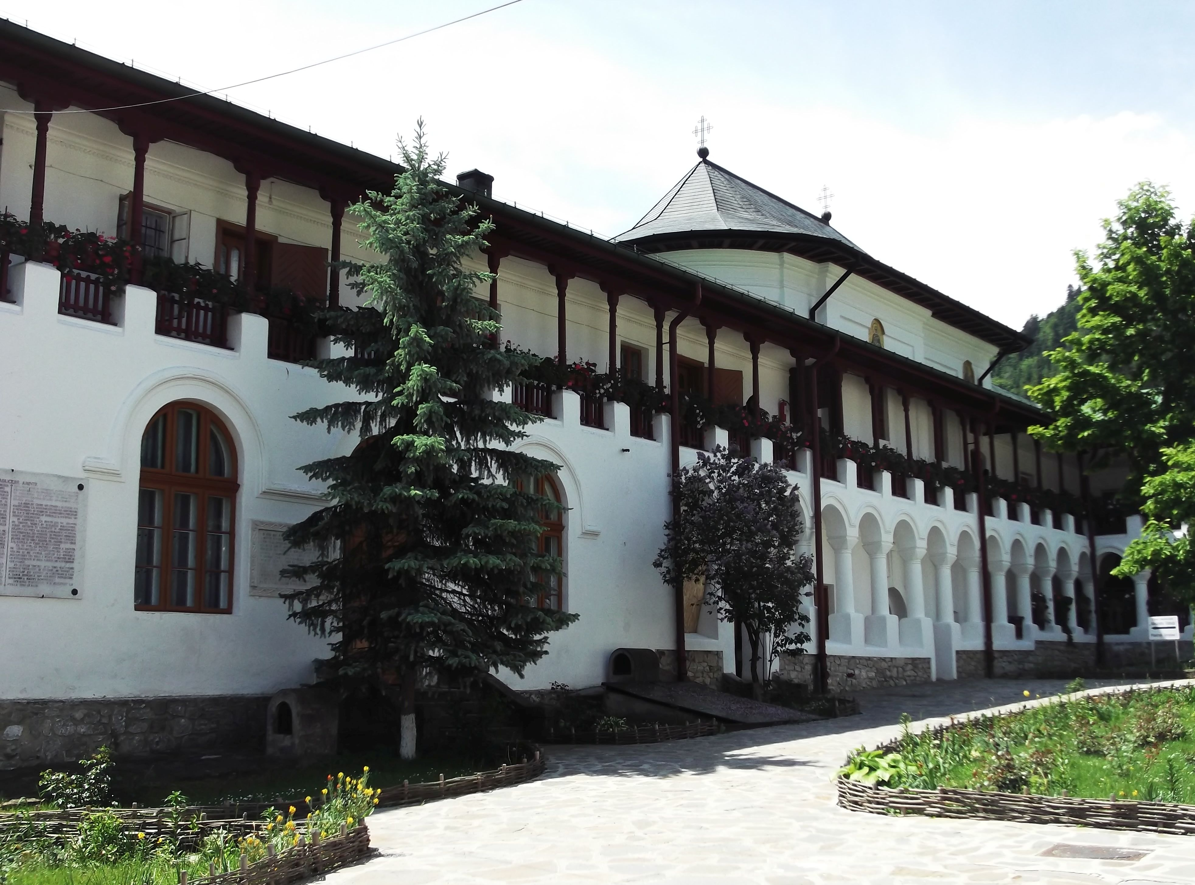 Construcții din incinta Mănăstirii Agapia 05